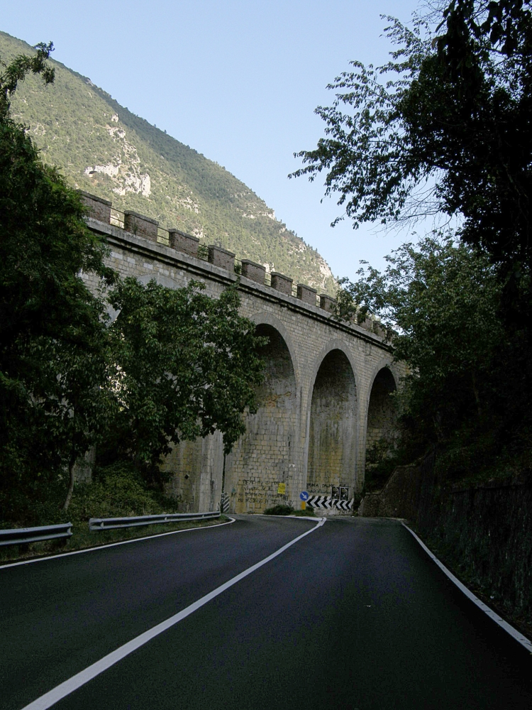 Gola di S. Venanzio